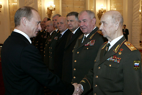 На встрече с высшими офицерами. Справа - Маршал Советского Союза в отставке, советник Министерства обороны С.Соколов, Маршал Советского Союза в отставке, советник Военно-мемориального центра Вооруженных Сил России – Д.Язов